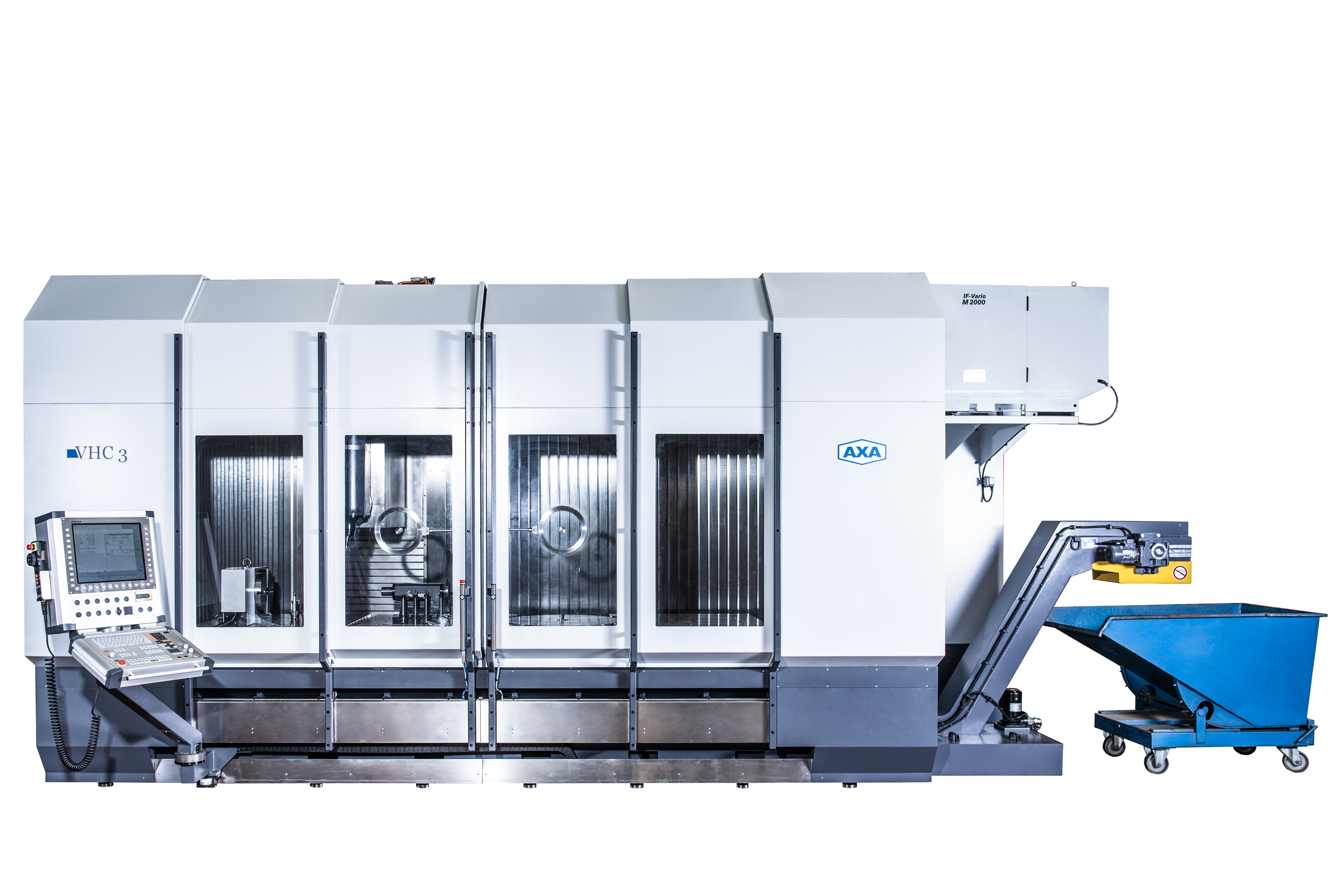 AXA